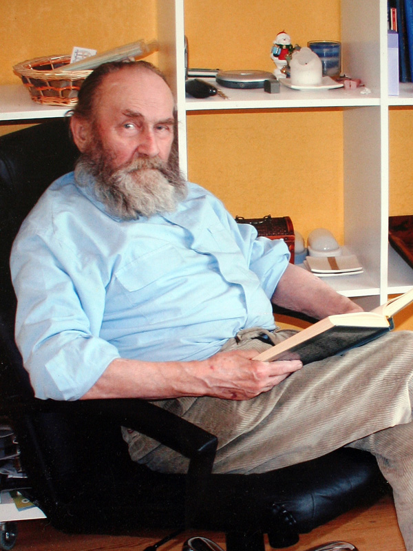 Ain Amjärve portree. 2005. aasta. Pildistatud Tallinnas, Tartu mnt